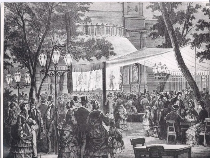 Występy Teatru Ogródkowego